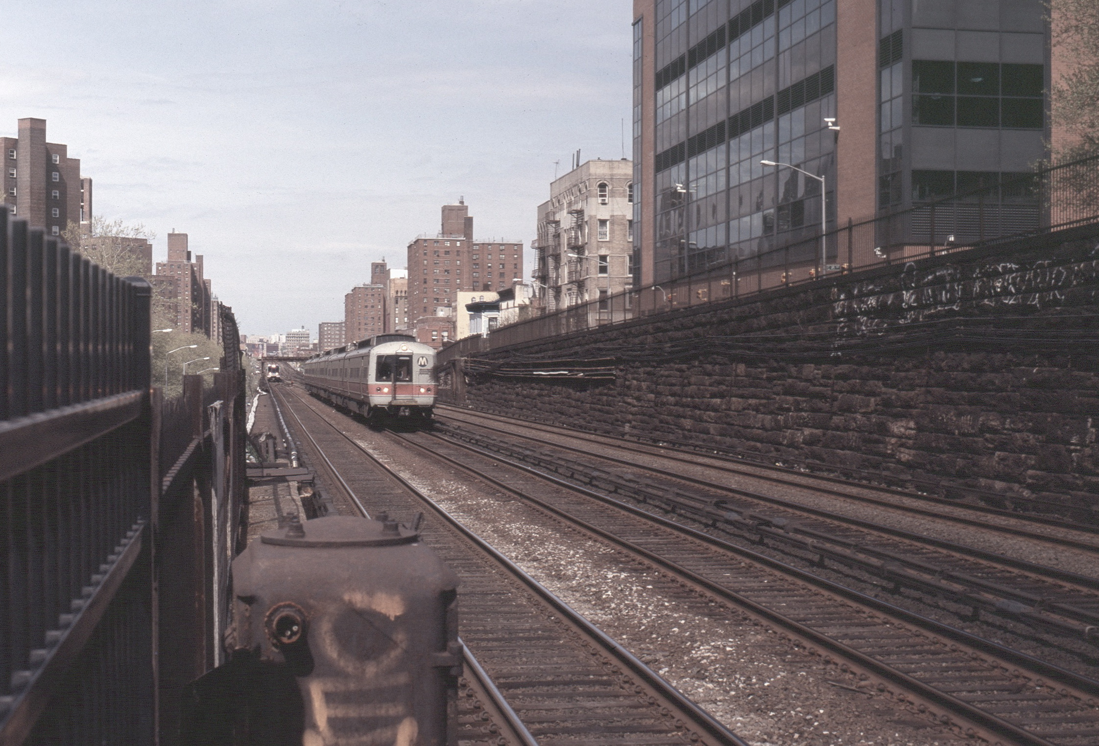 Zwei Züge der Metro-North vor der Einfahrt in den Tunnelmund zur Grand Central Station